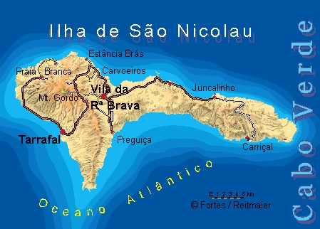 Kartographie: Lucete Fortes / Pitt Reitmaier Design. Pitt Reitmaier Karte vom Urheber hochgeladen